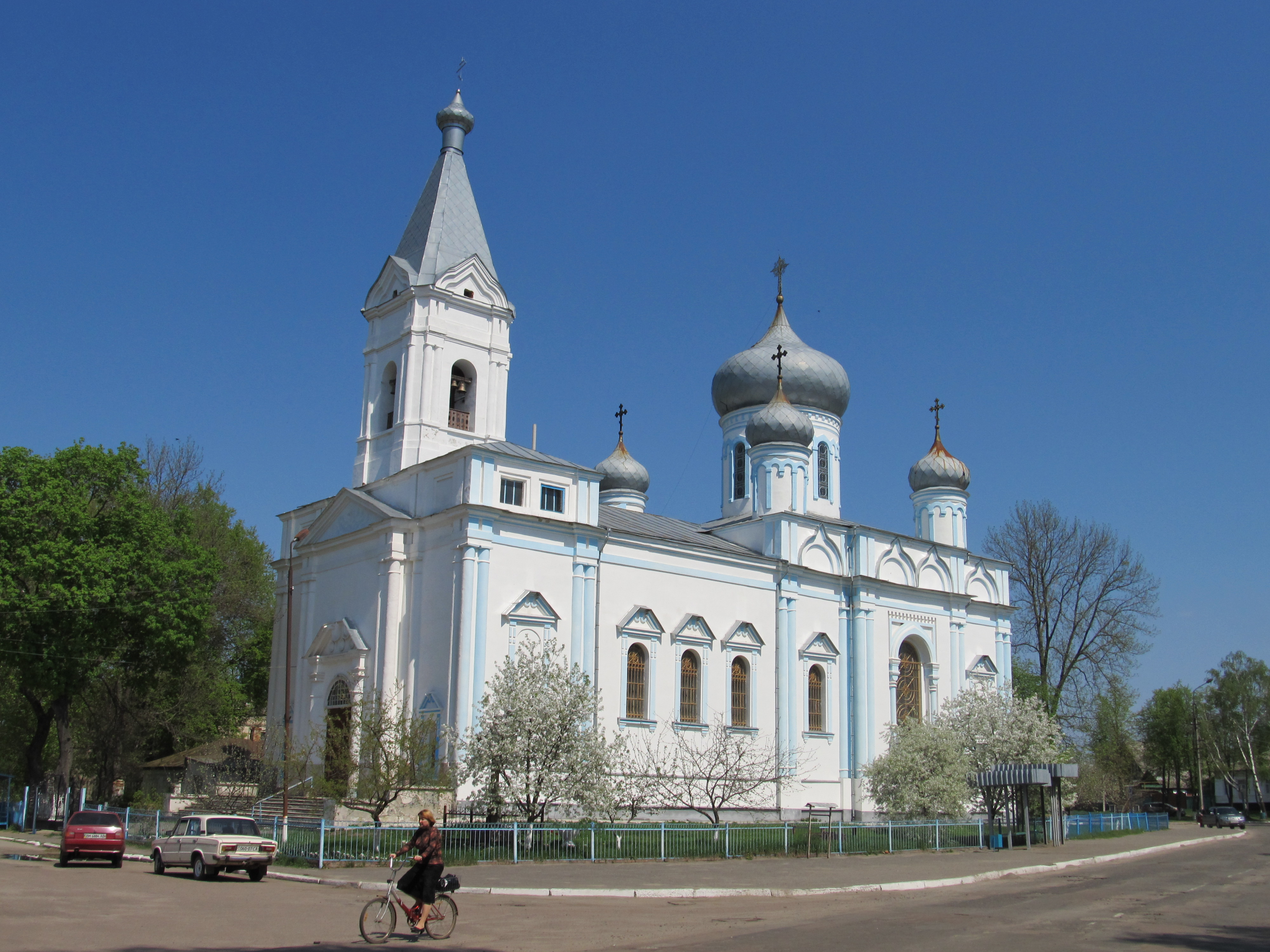 Вознесенська церква 1858 року в Лебедині